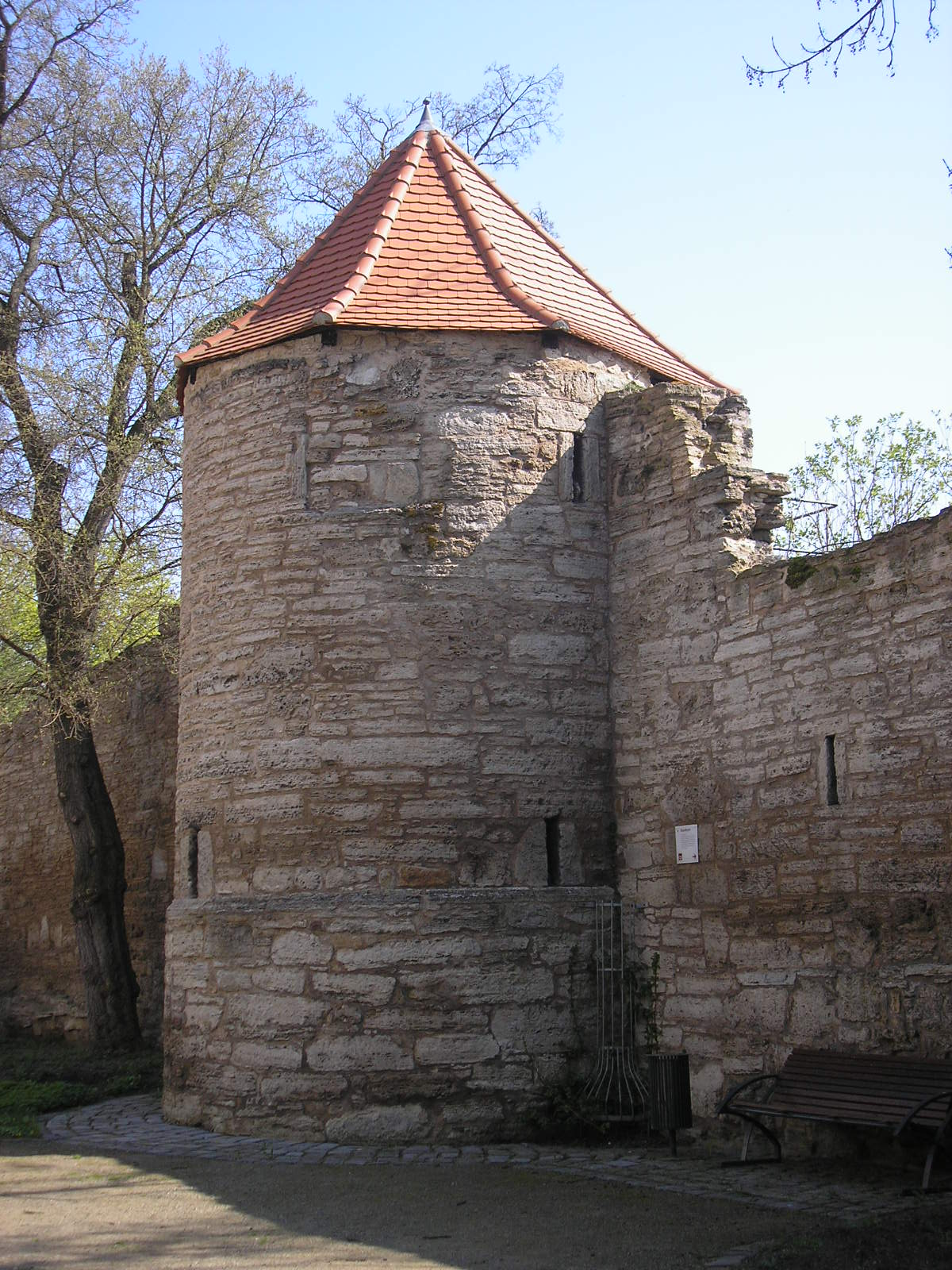 Teil der Stadtbefestigung in Bad Langensalza (Thüringen).